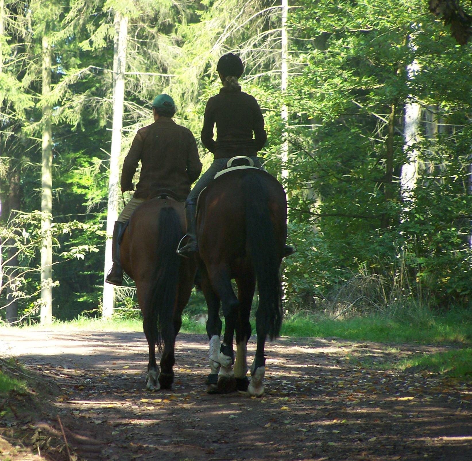 Am Mosbacher Marktweg unweit der Weinstraße. Die waldreiche und verkehrsberuhigte Lage von Mosbach macht den Ort zum idealen Ausflugsort für Reiter.